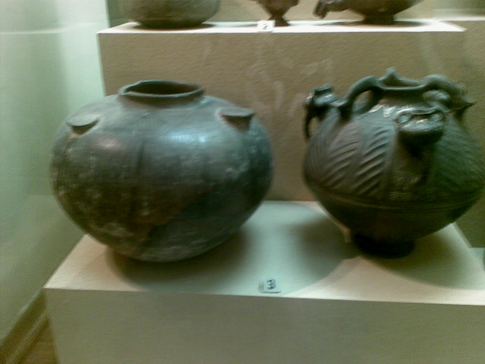 Daşsalahlı saxsı küplər, Azərbaycan Tarix Muzeyində saxlanılır